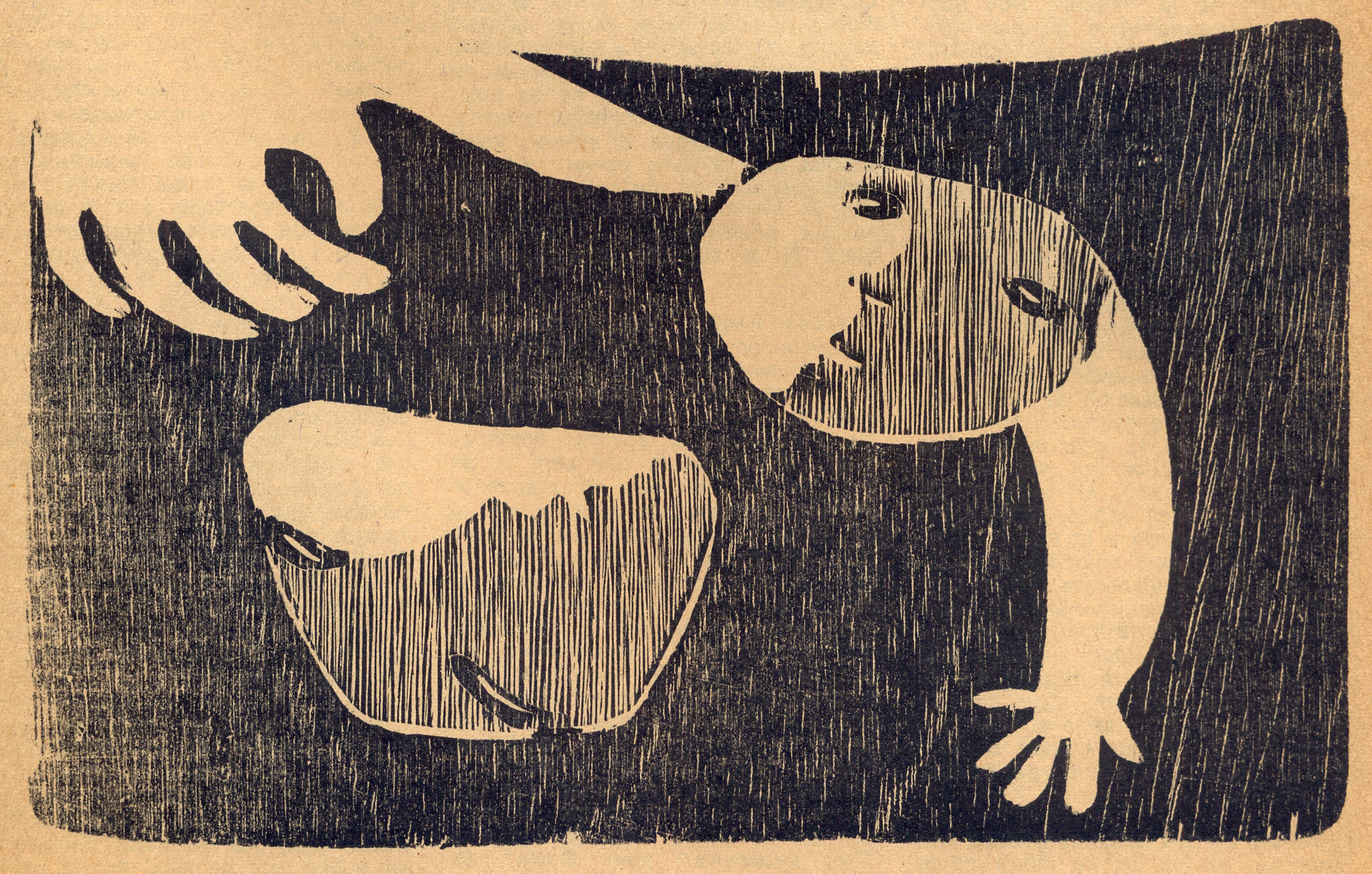 Xilograbado publicado en la revista Criterio